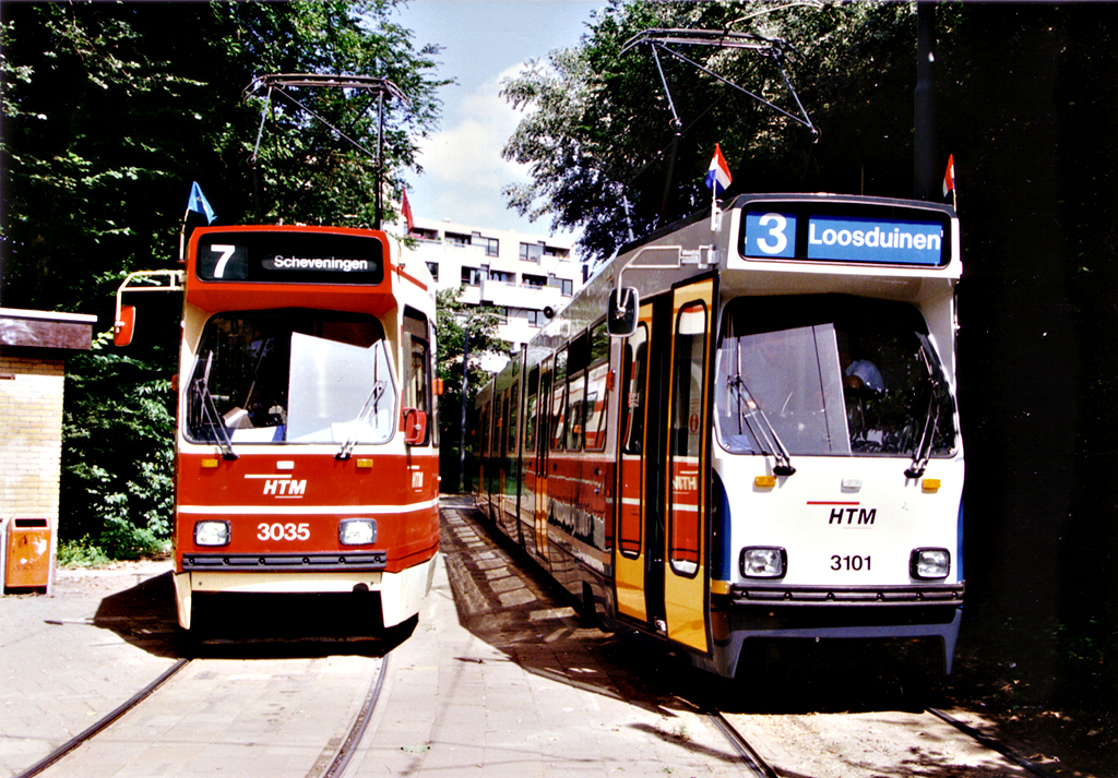 Twee uitvoeringen van de GTL in Den Haag